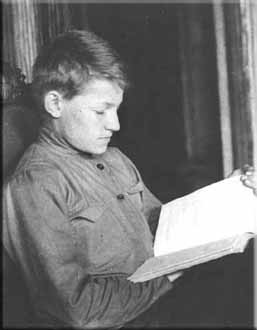 Nikolái_Moiséev (1902-1955)